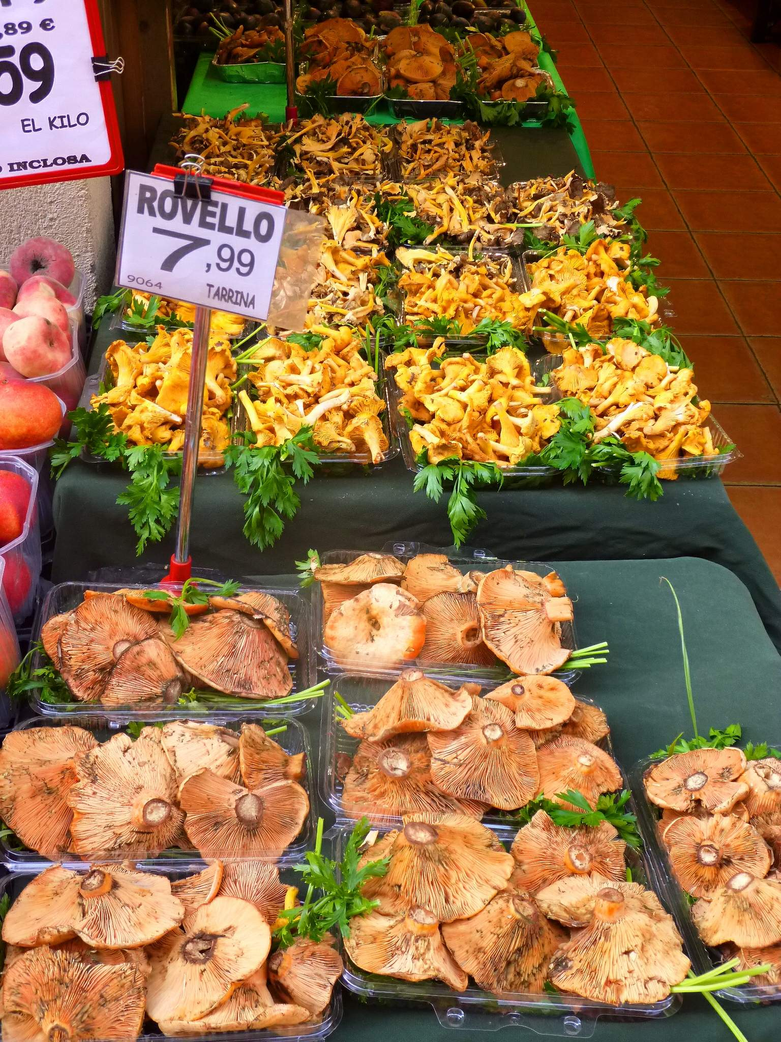 Puesto de hongos en Reus (Tarragona)